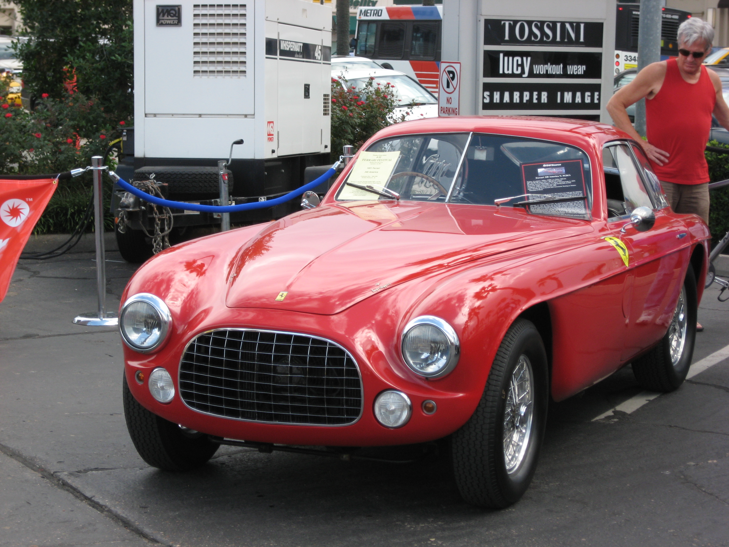 1951 Ferrari 340 America